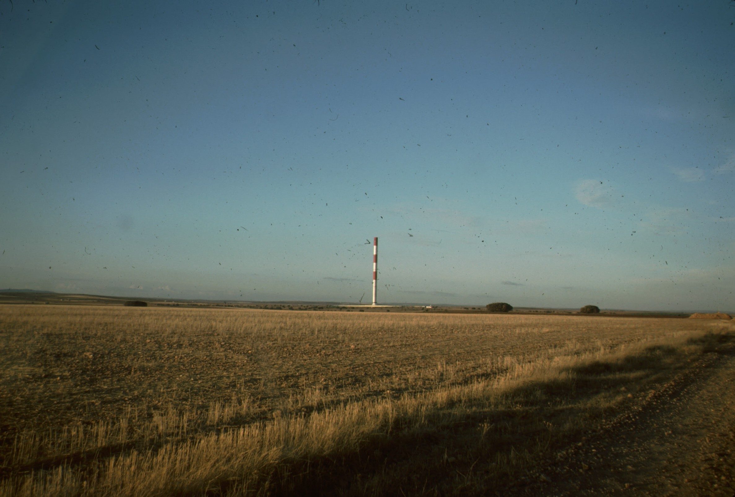 Pilotanlage Manzanares von La Solana (La Mancha) aus gesehen